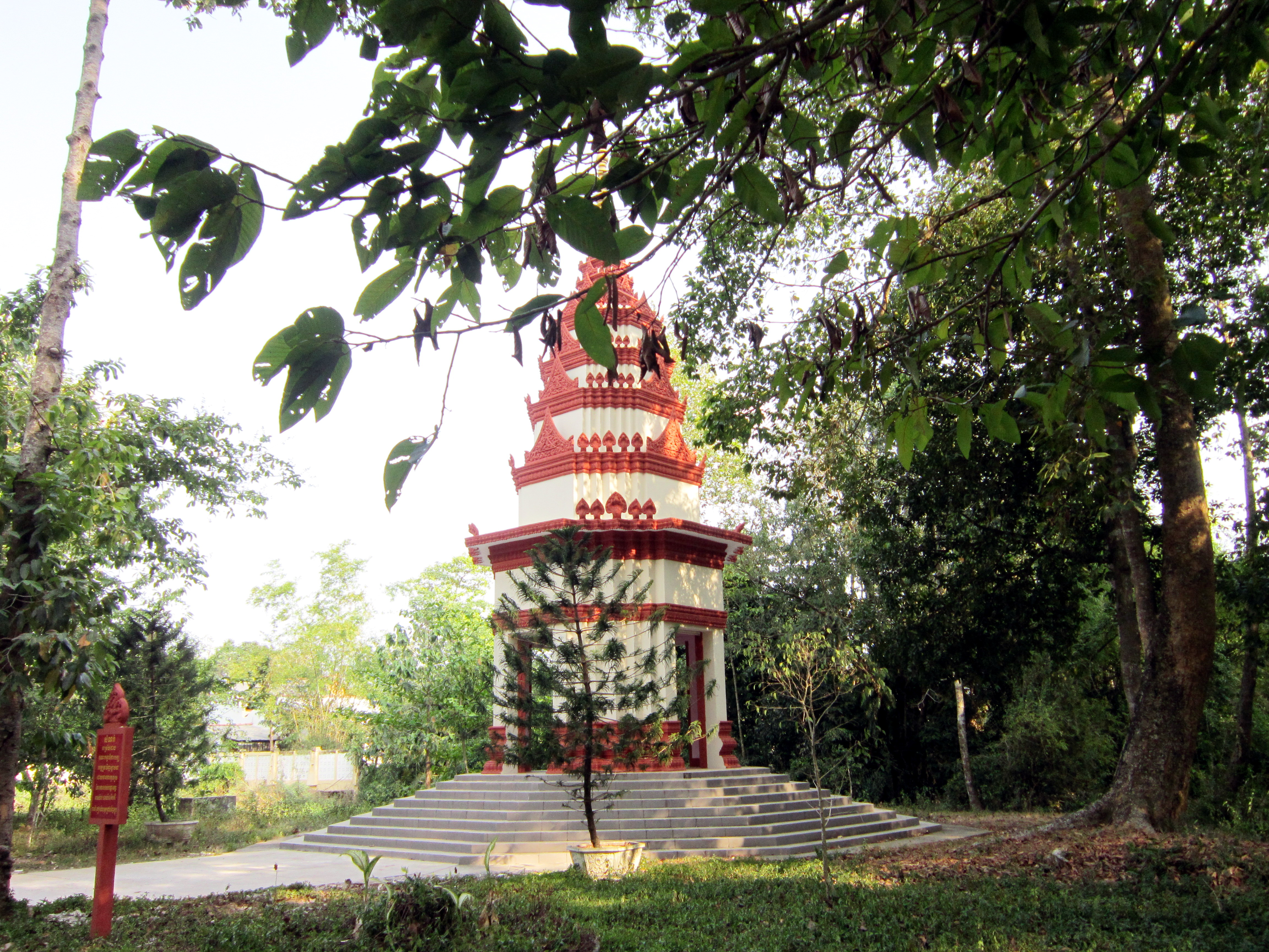 Một ngôi tháp trong khuôn viên Bảo tàng văn hóa dân tộc Khmer tỉnh Trà Vinh; hiện tọa lạc tại khóm 4, phường 8, thành phố Trà Vinh, tỉnh Trà Vinh, Việt Nam.